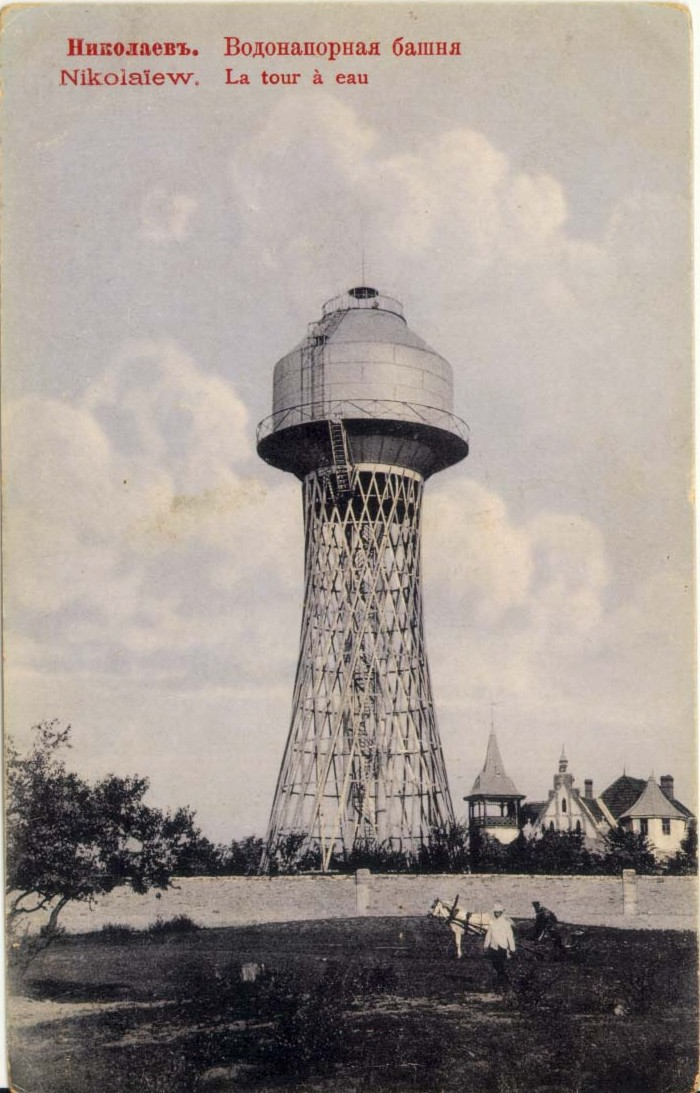 « Nikolaïew. La tour à eau »